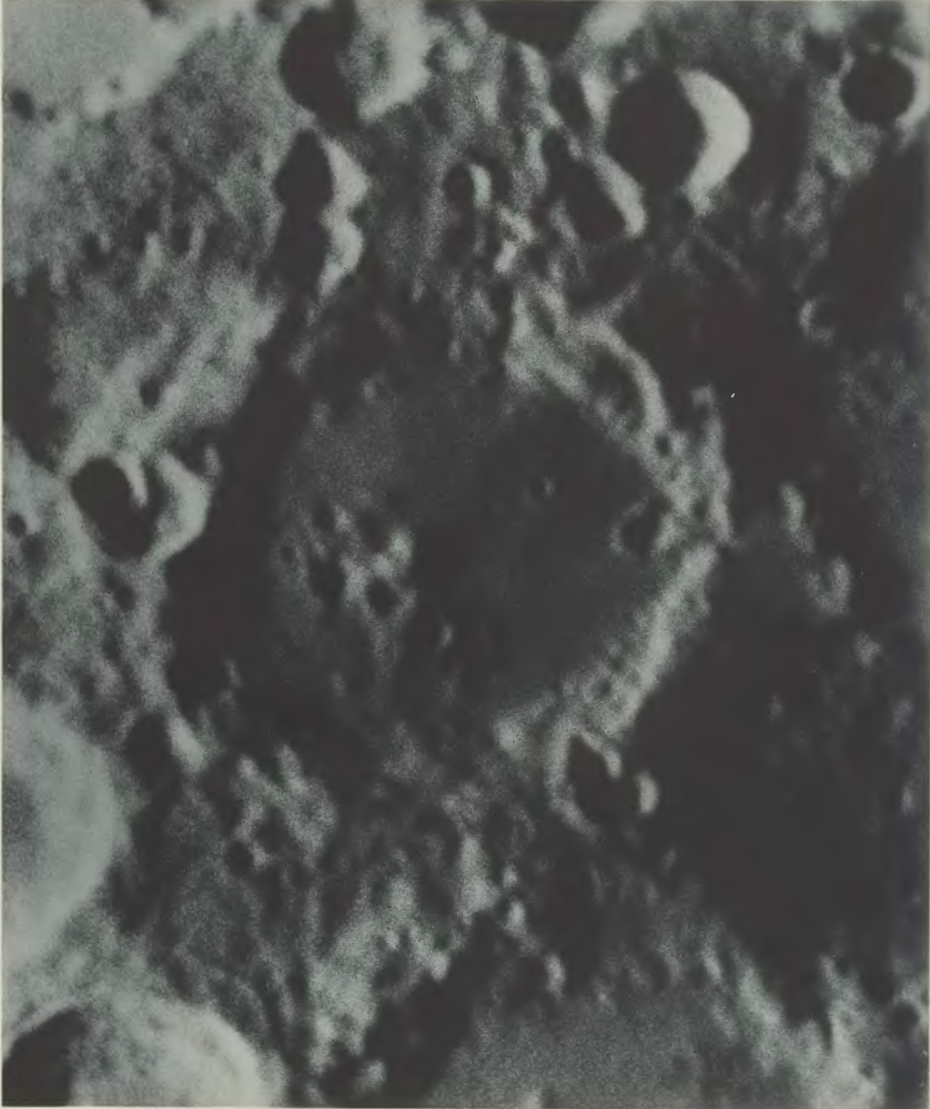 Photographischer Mond-Atlas vornehmlich auf Grund von focalen Negativen der Lick-Sternwarte im Massstabe eines Monddurchmessers von 10 Fuss ausgeführt von Professor Ladislaus Weinek. Heft IV. Tafel 77